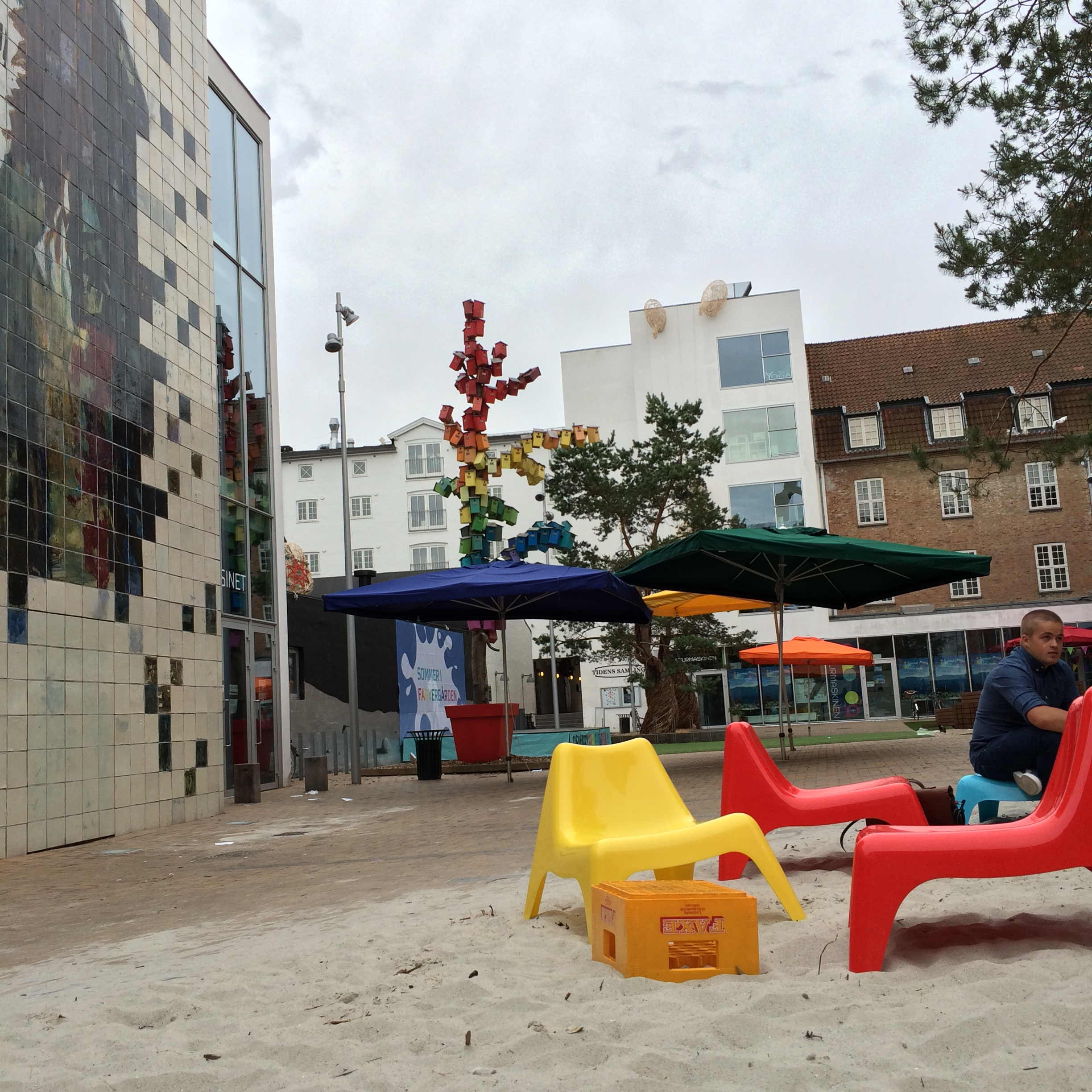 Sommer i Farvergården, juli 2014